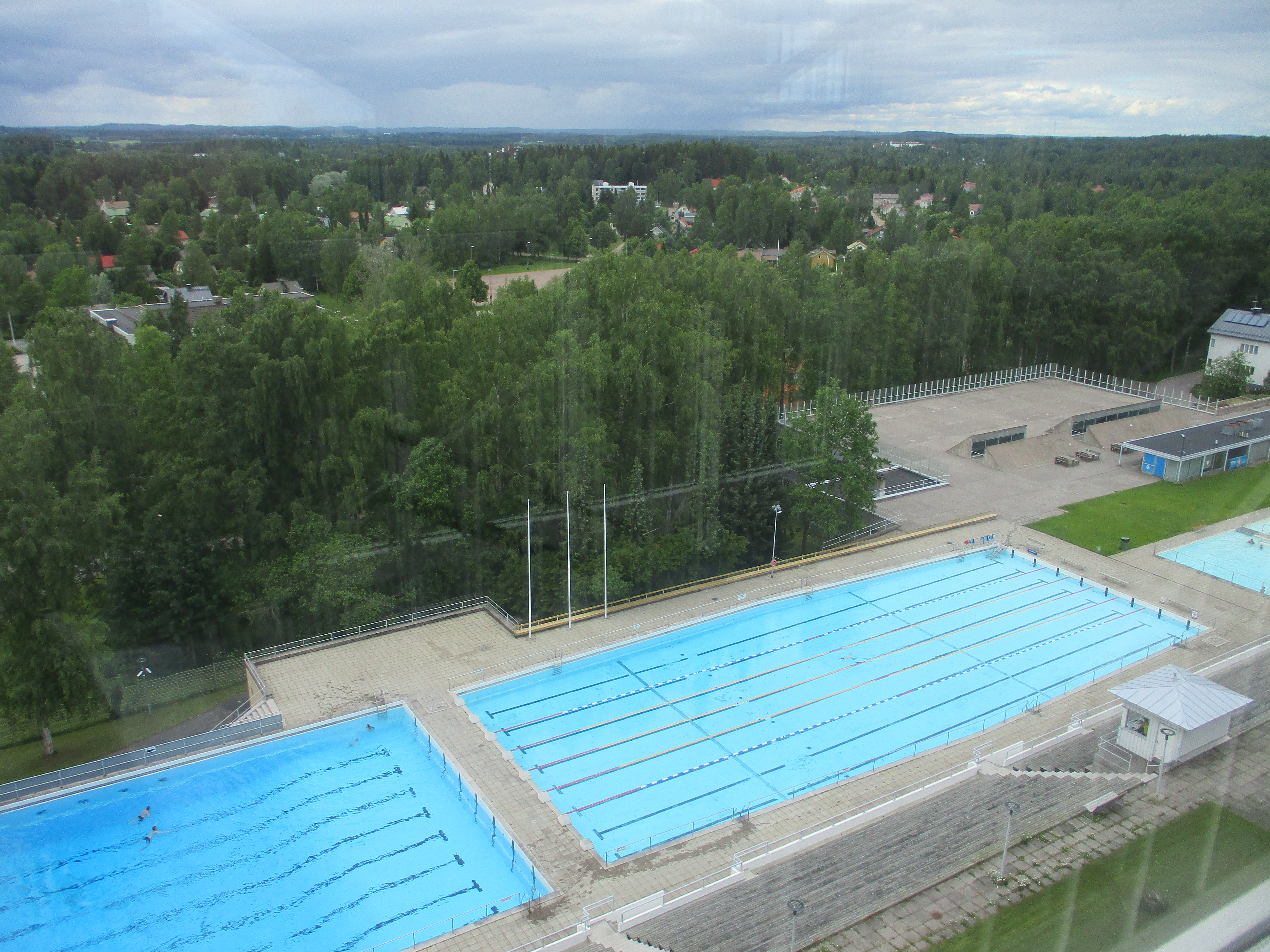 Riihimäen urheilupuisto; kulttuuriperintökohde, Riihimäki